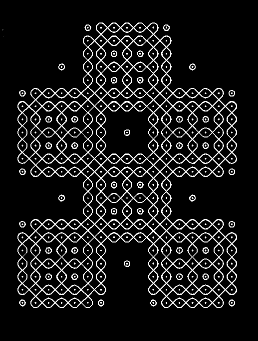 Drawn by mayooranathan